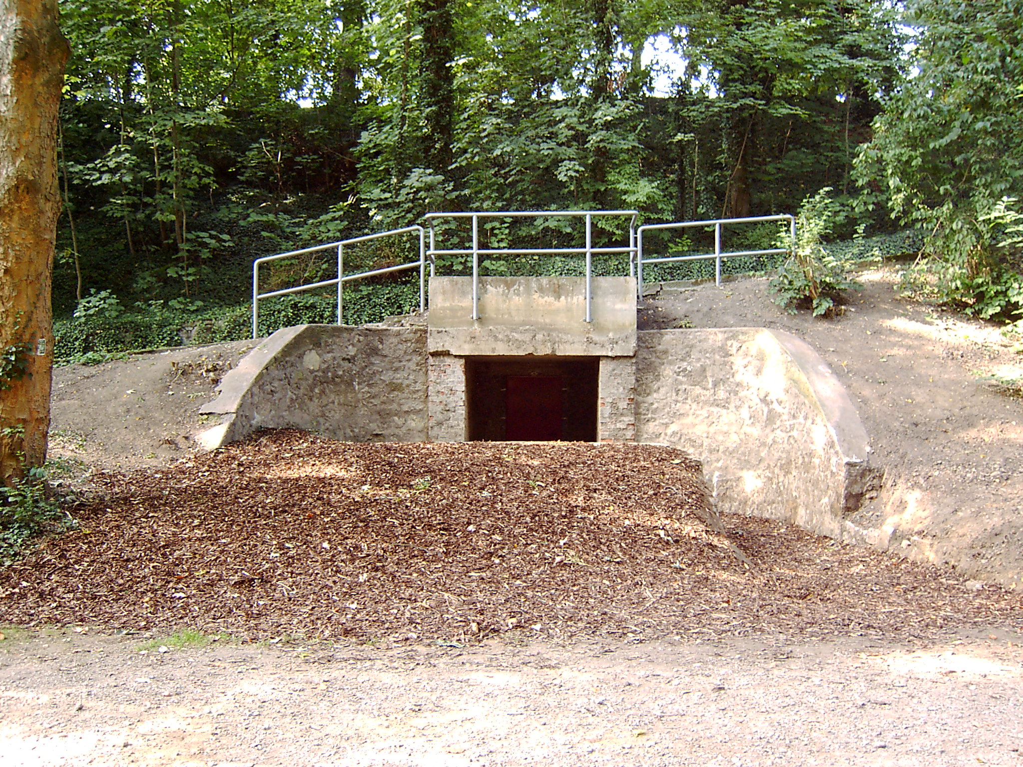 wallseitiger Eingang zum Käsekeller in Hildesheim